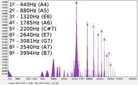 Espectrograma d'un to pur passat a través d'un pedal de distrosió (o sigui dels harmònics d'aquest)